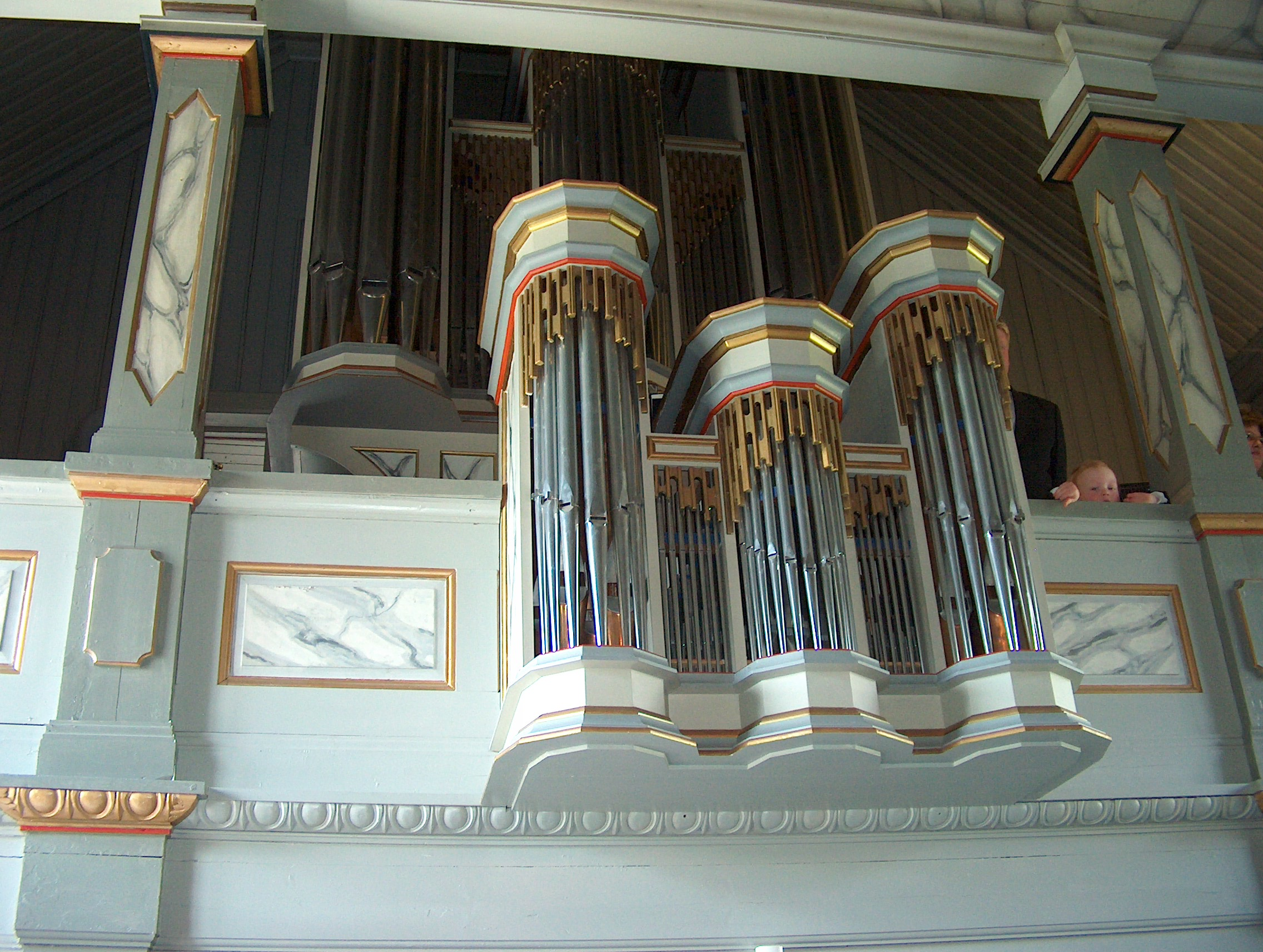 Orgelet i Lunder kirke, Sokna